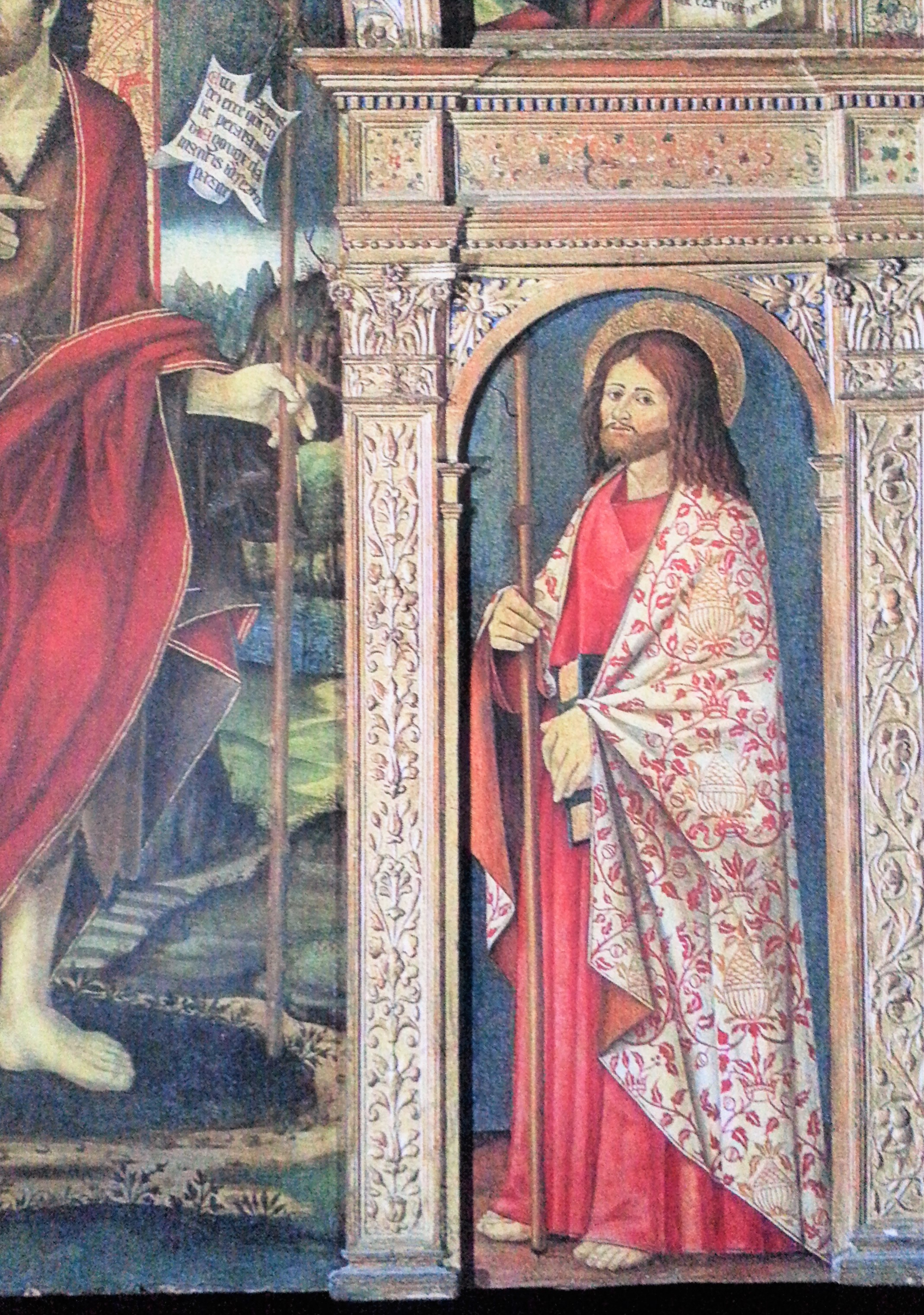 Particolare dell'ancona dei Marinoni con intaglio della cornice opera di Donato Prestinari